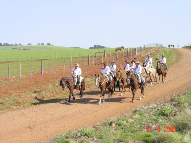 Grupo de tradicionalistas cavalgando no interior do Rio Grande do Sul